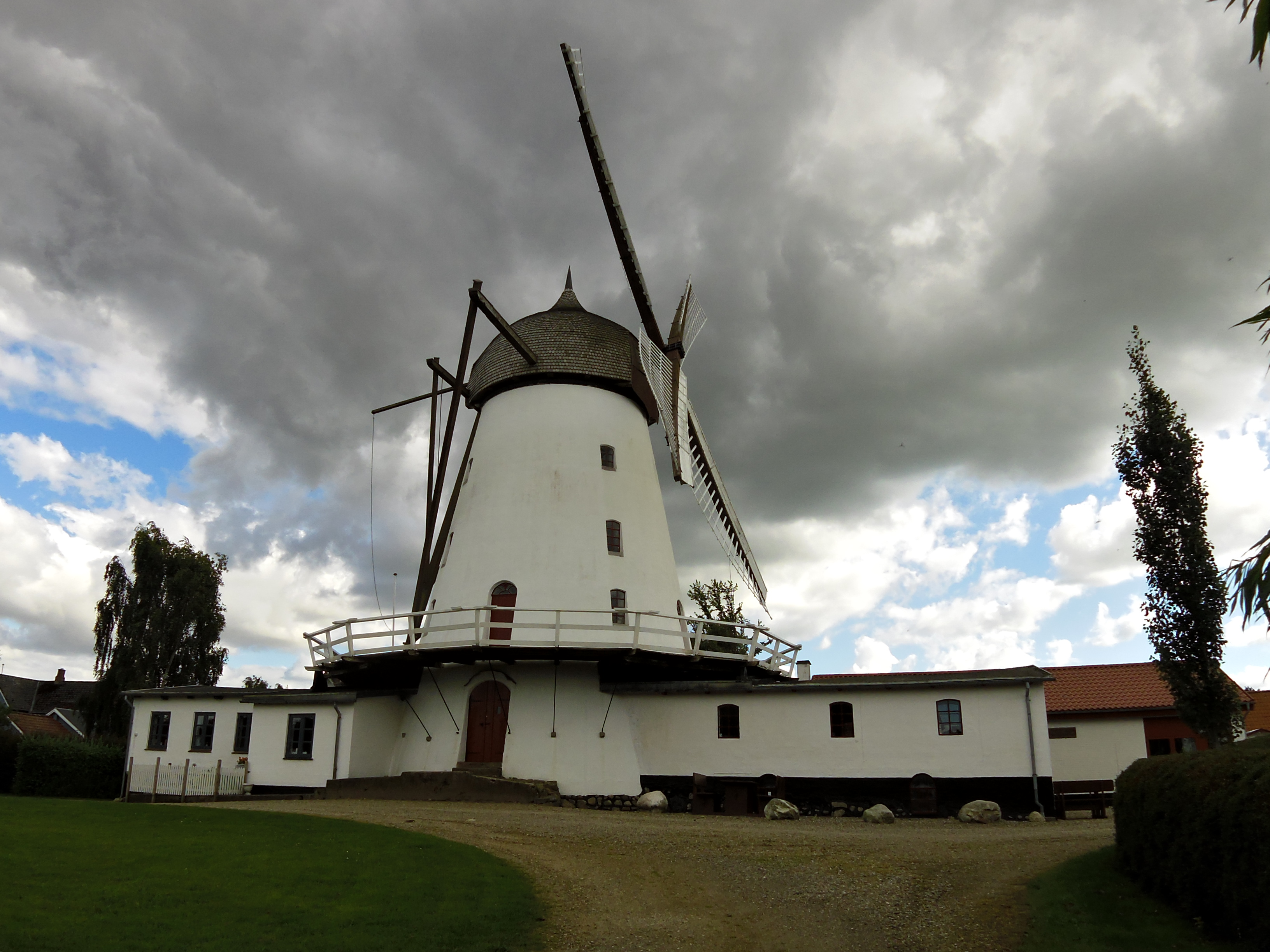 Jels Mølle